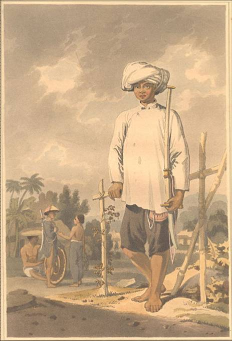 Binh lính Tây Sơn